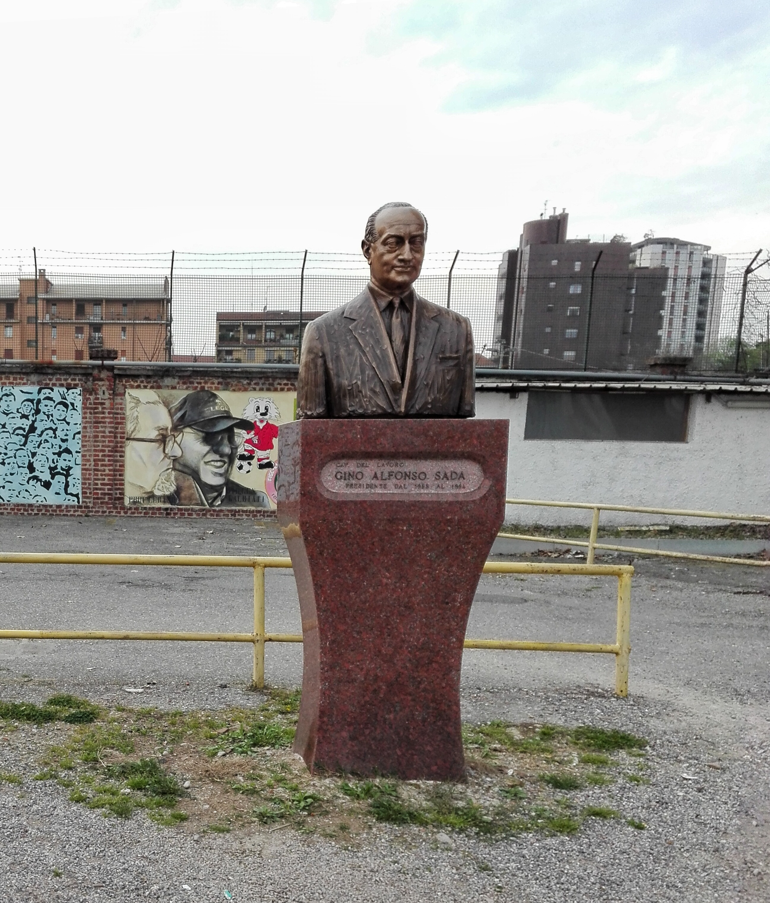 monumento in ricordo di gino alfonso sada presente all'entrata dello stadio